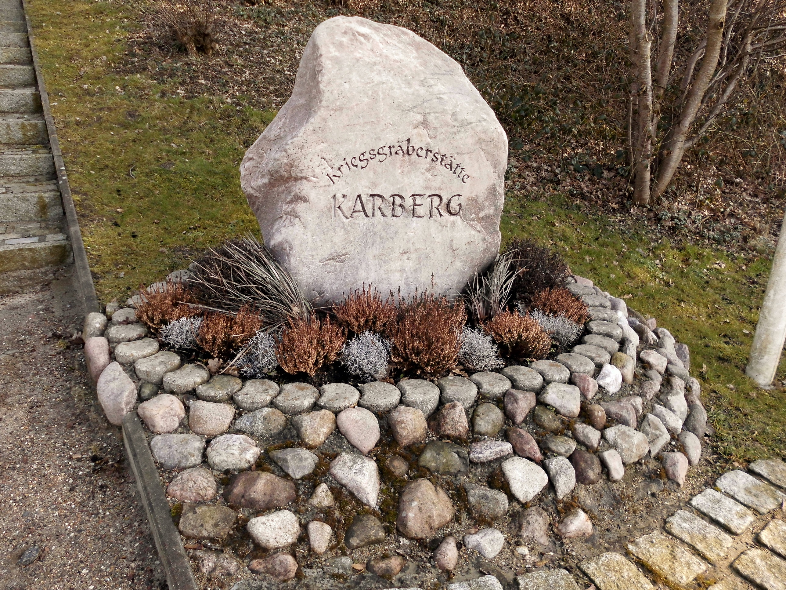 Stein am Haupteingang der Kriegsgräberstätte Karberg.